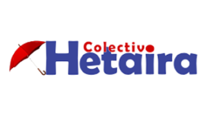 El Colectivo Hetaira fue un colectivo por los derechos de las prostitutas español existente entre 1995 y 2019.